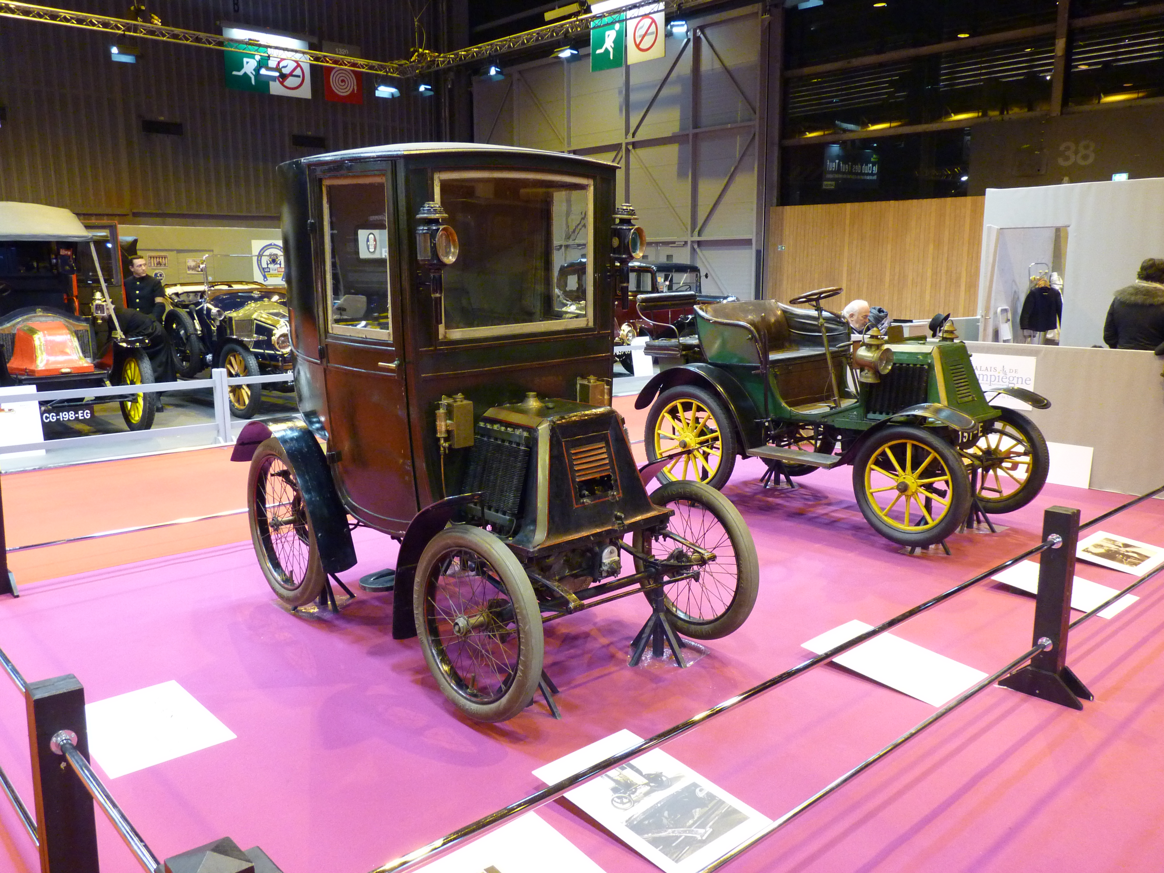 Rétromobile 2018 - 120 ans Renault - Musée de Compiègne